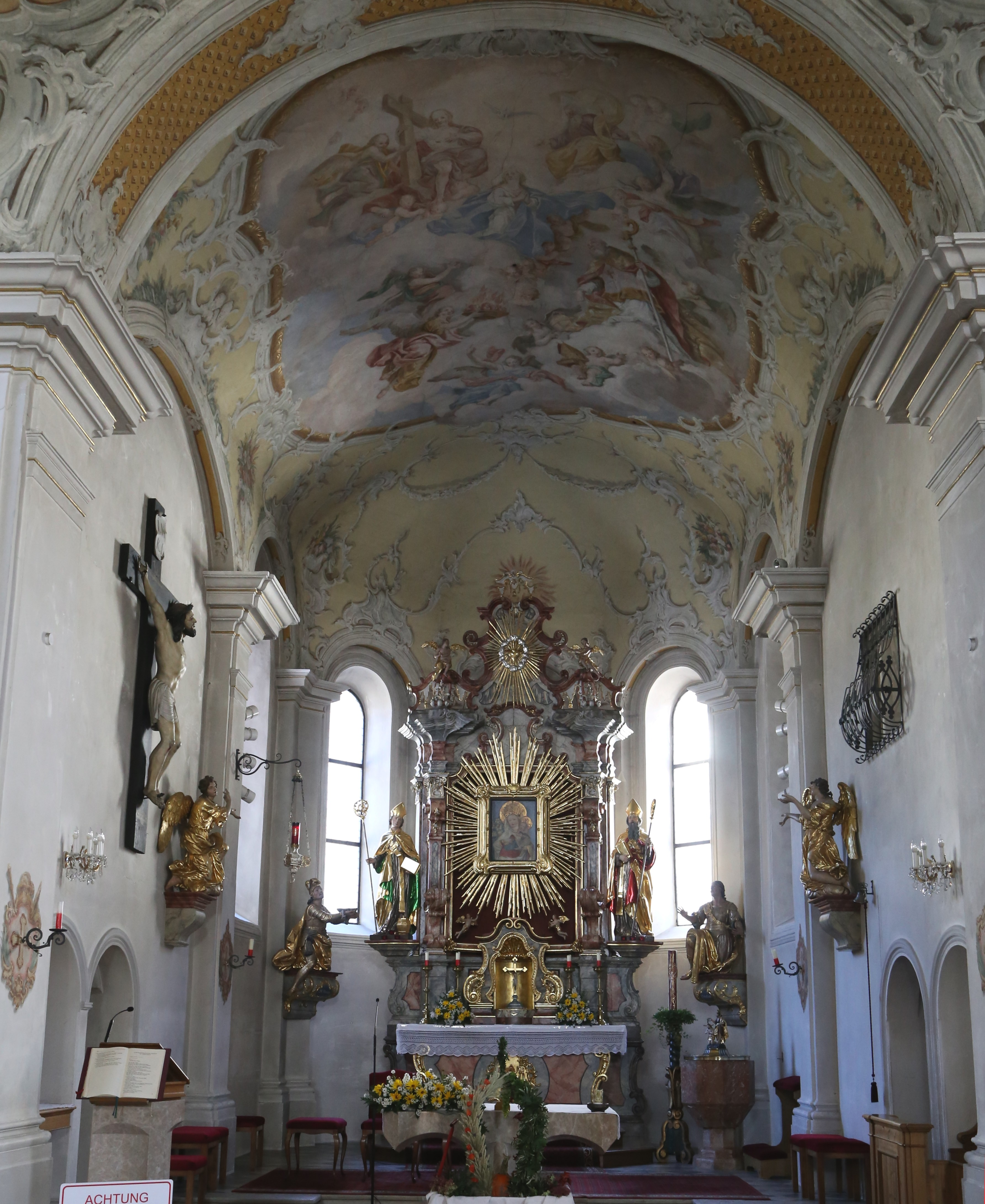 Dorf 15a, Stumm (Tirol); Kath. Pfarrkirche hl. Rupert